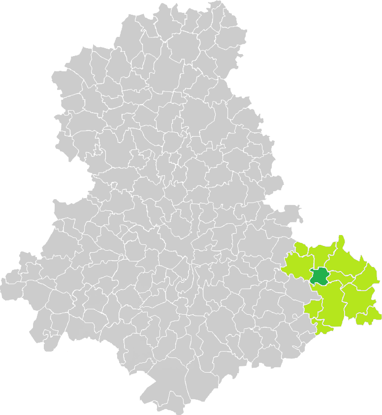 Carte de situation de la commune de Augne (en vert foncé) dans le votre Canton (en vert clair) sur une carte des communes de la Haute-Vienne